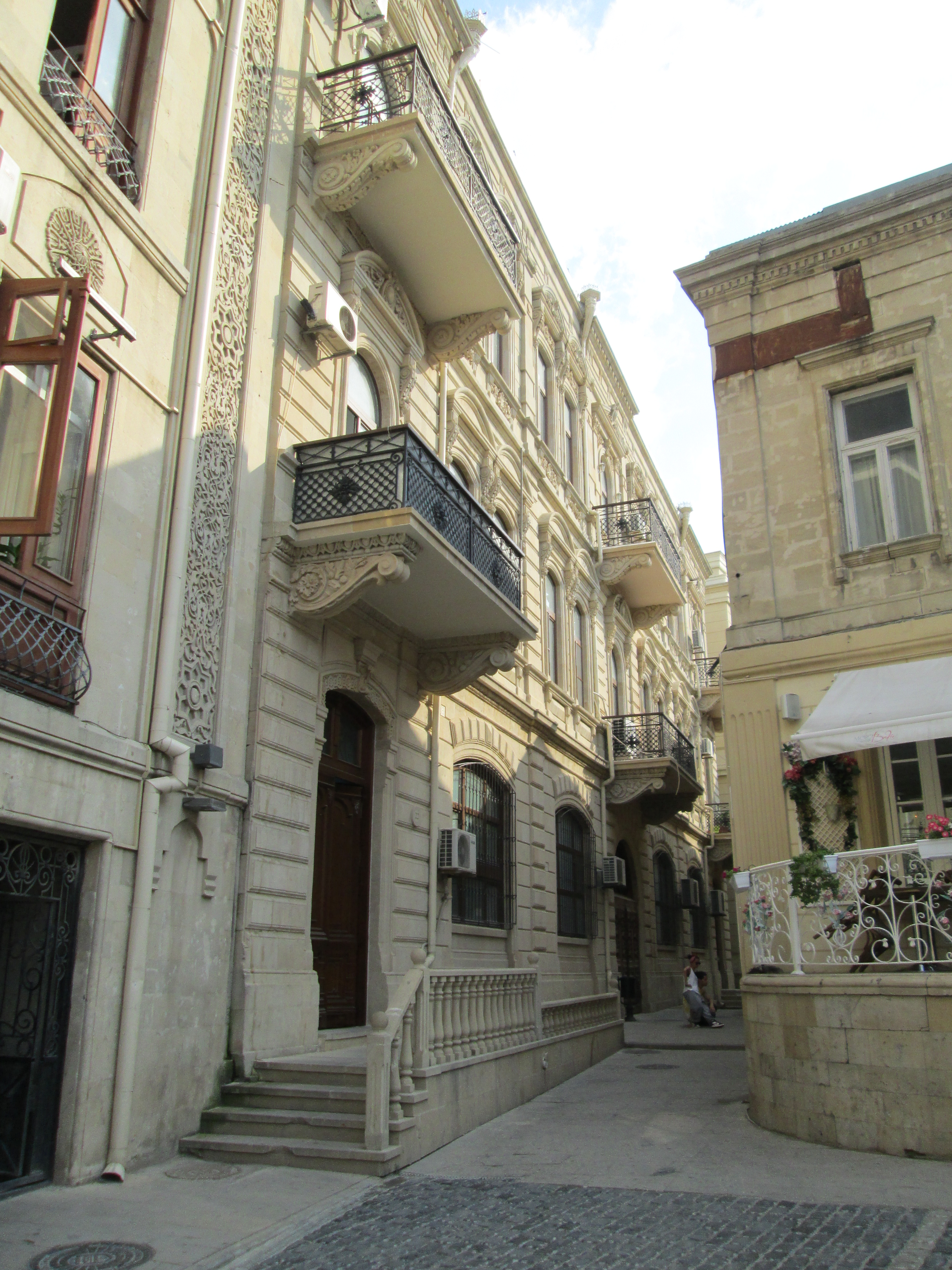 Vəli Məmmədov 22